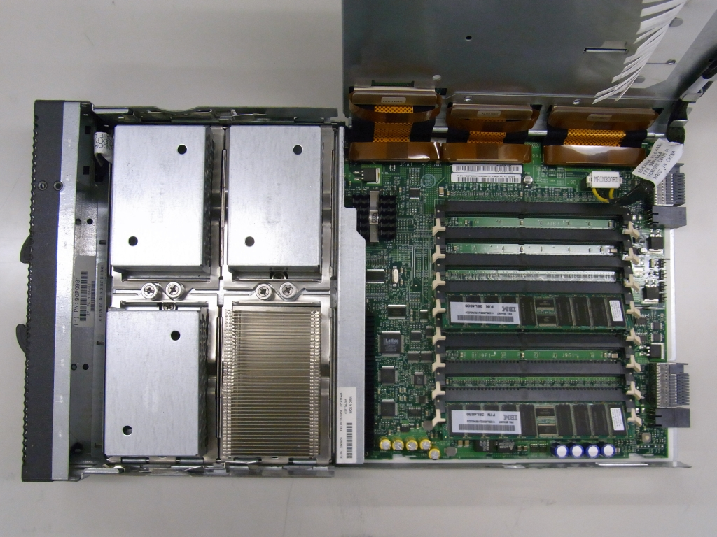 IBM_BladeCenter_HS21_8853_